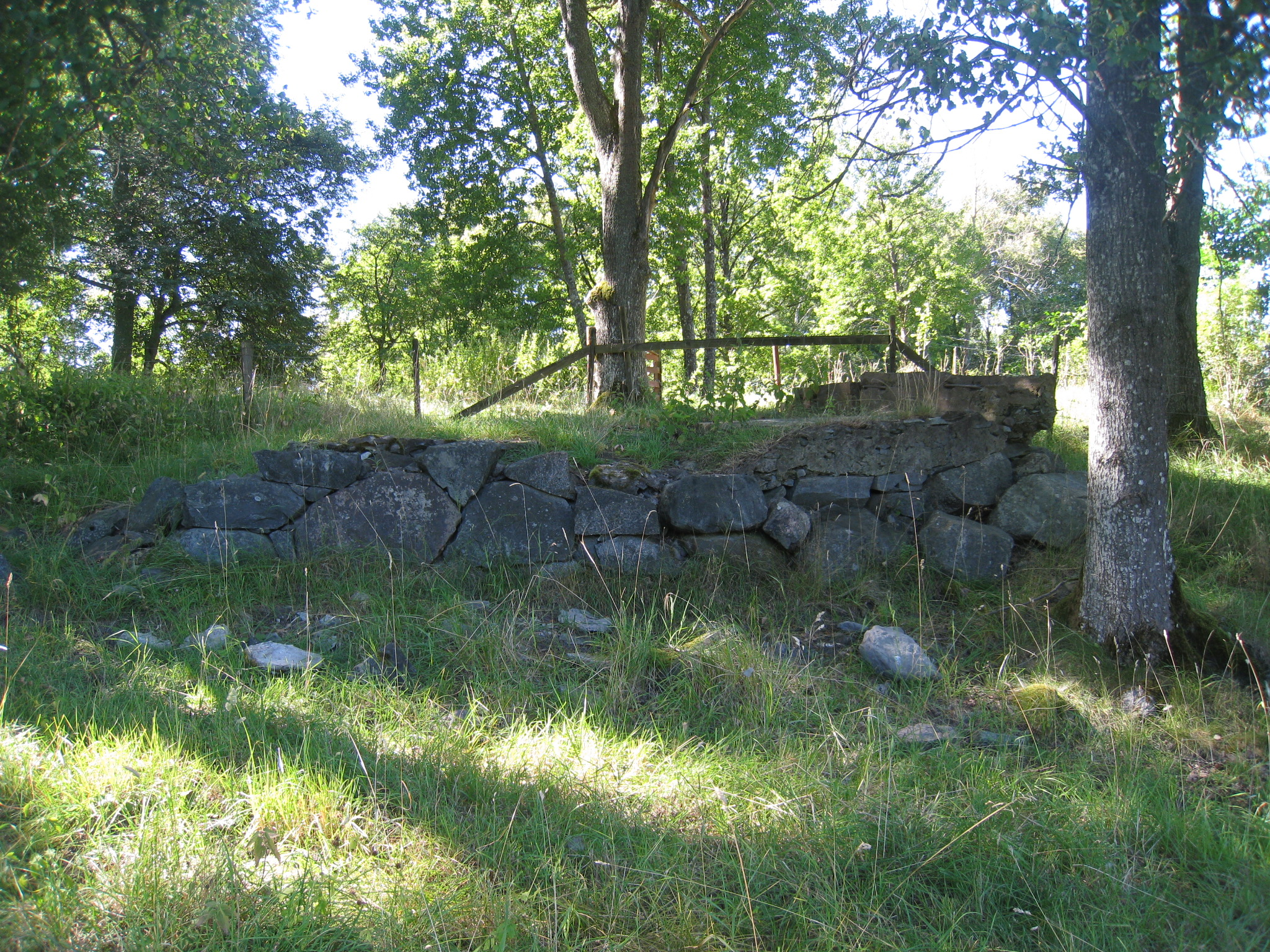 Husgrund till Kallbrunna skogvaktarboställe i Hummelmora hage i Görvälns naturreservat, Järfälla kommun.